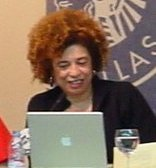 Angela Davis en la exposición del libro "mujer, genero y raza" en su lanzamiento en el Circulo de Bellas Artes de Madrid, España 2005